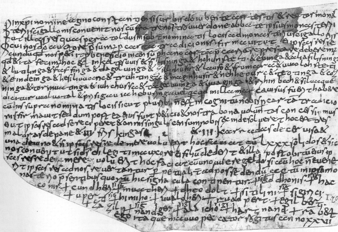 Lehensurkunde St. Gallen 27. März 793